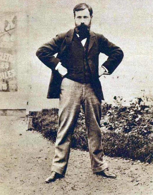 Henri Desgranges en juillet 1897, pour l'ouverture du Parc des Princes.